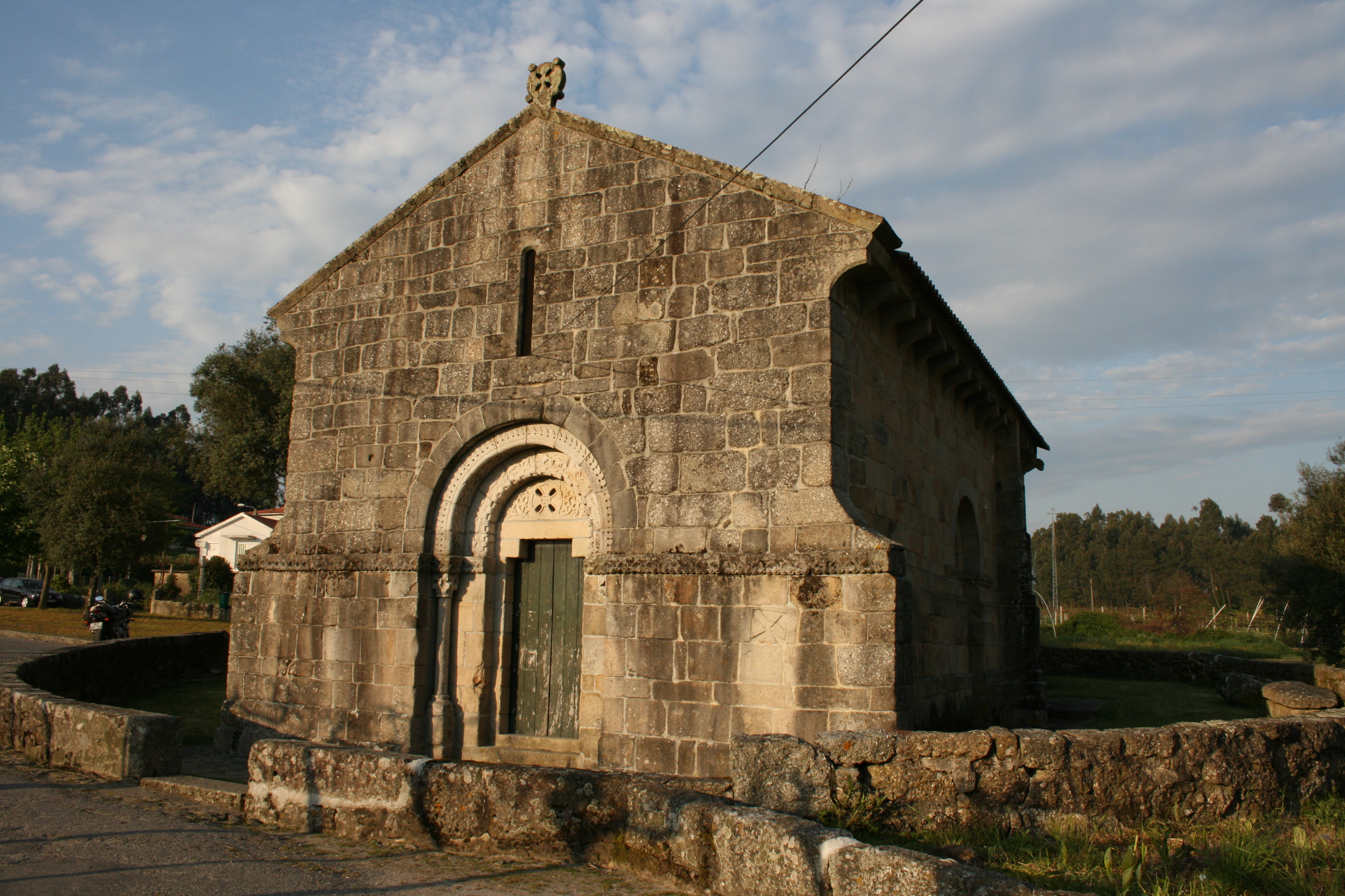 Vista geral da Igreja do Mosteiro de Santa Maria de Arnoso